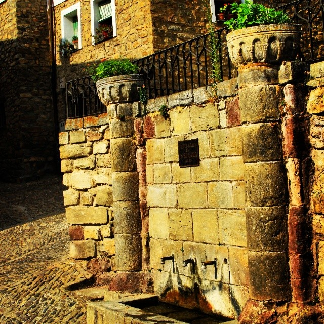 Fuente de los tres caños. (foto Instagram)